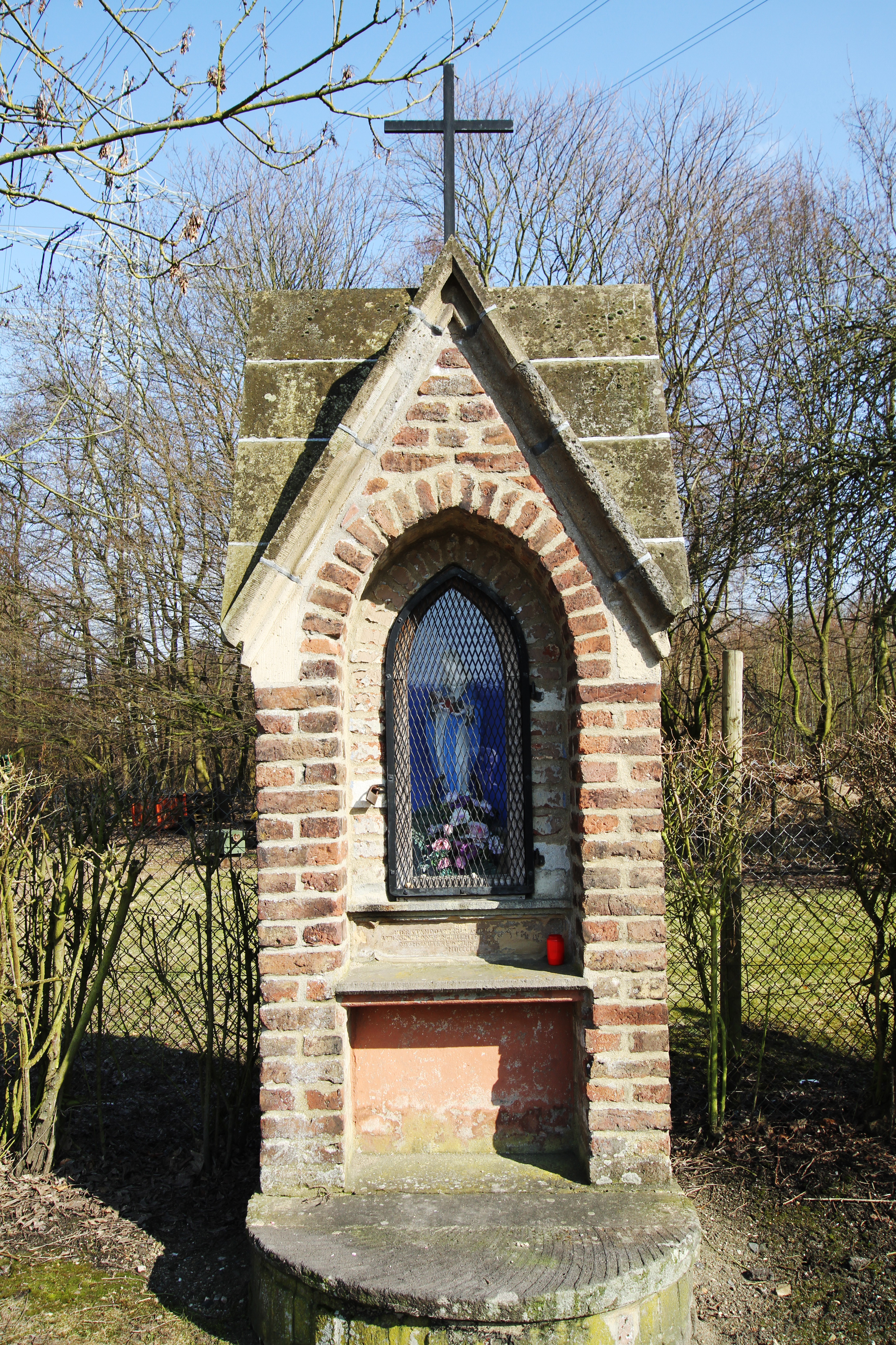 Alstädten-Burbach. 1852 zur Erinnerung an das dortige Kloster von den Eheleuten Füngeling errichteter Bildstock